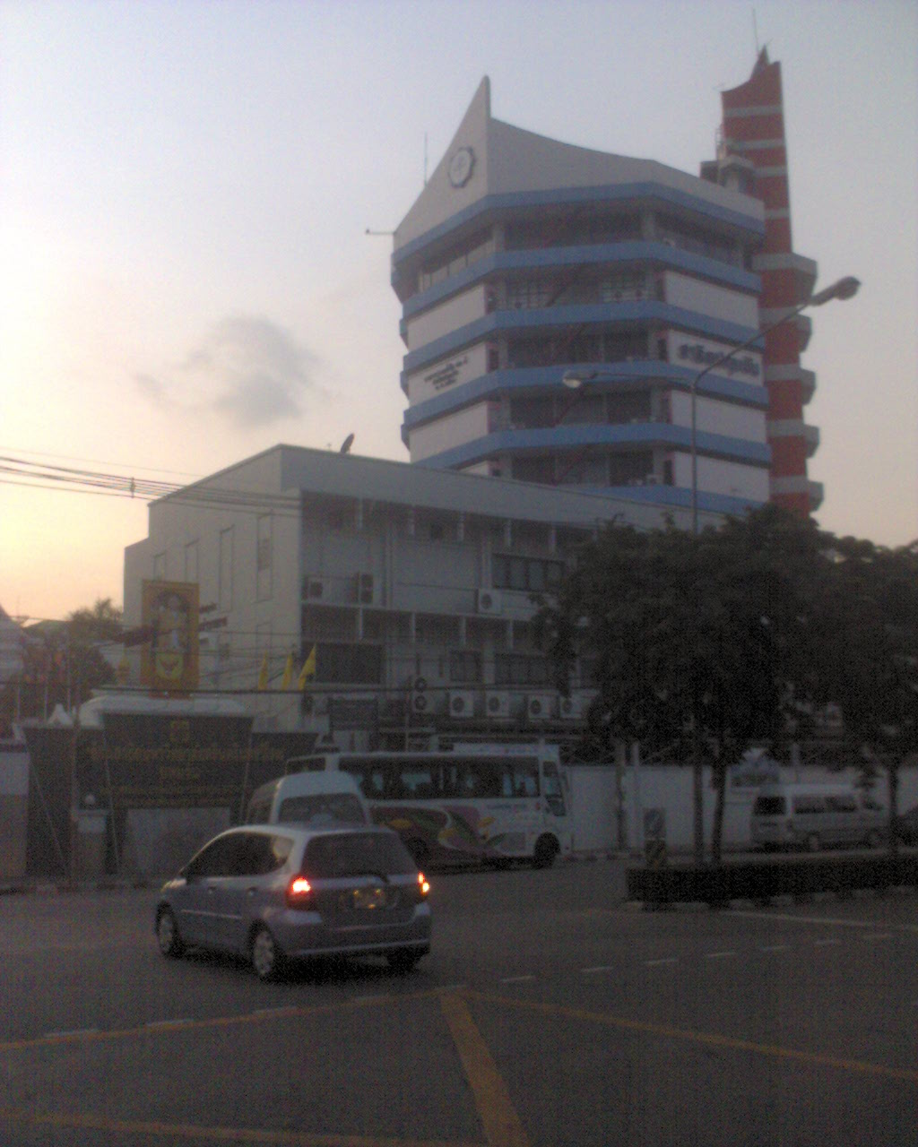 Satit Patumwan School (โรงเรียนสาธิตมหาวิทยาลัยศรีนครินทรวิโรฒ ปทุมวัน)